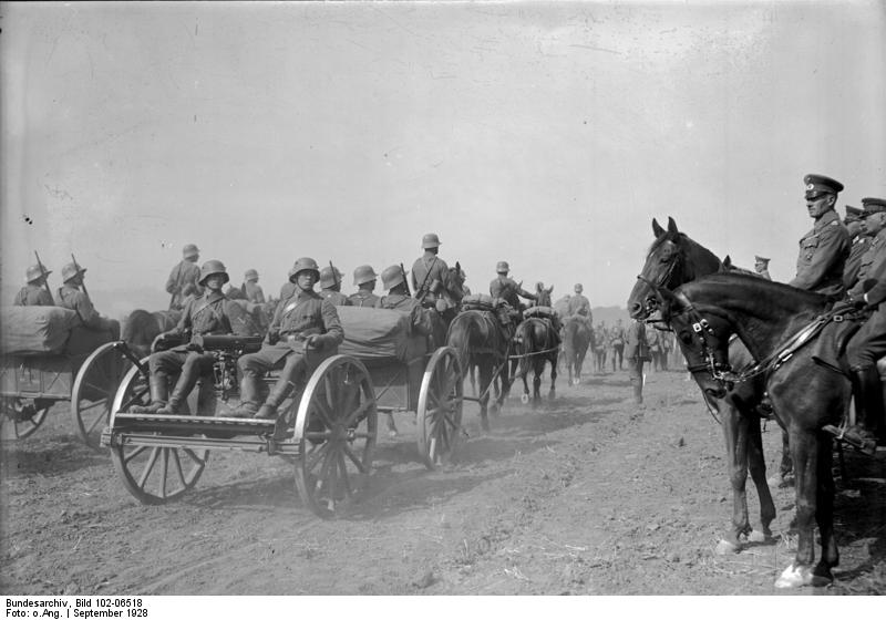 Die großen Herbstmanöver der III. Division in Prenzlau! General-Leutnant Hasse (rechts) nimmt die Parade der fahrbaren Maschinengewehr-Kompagnie im Manövergelände ab.